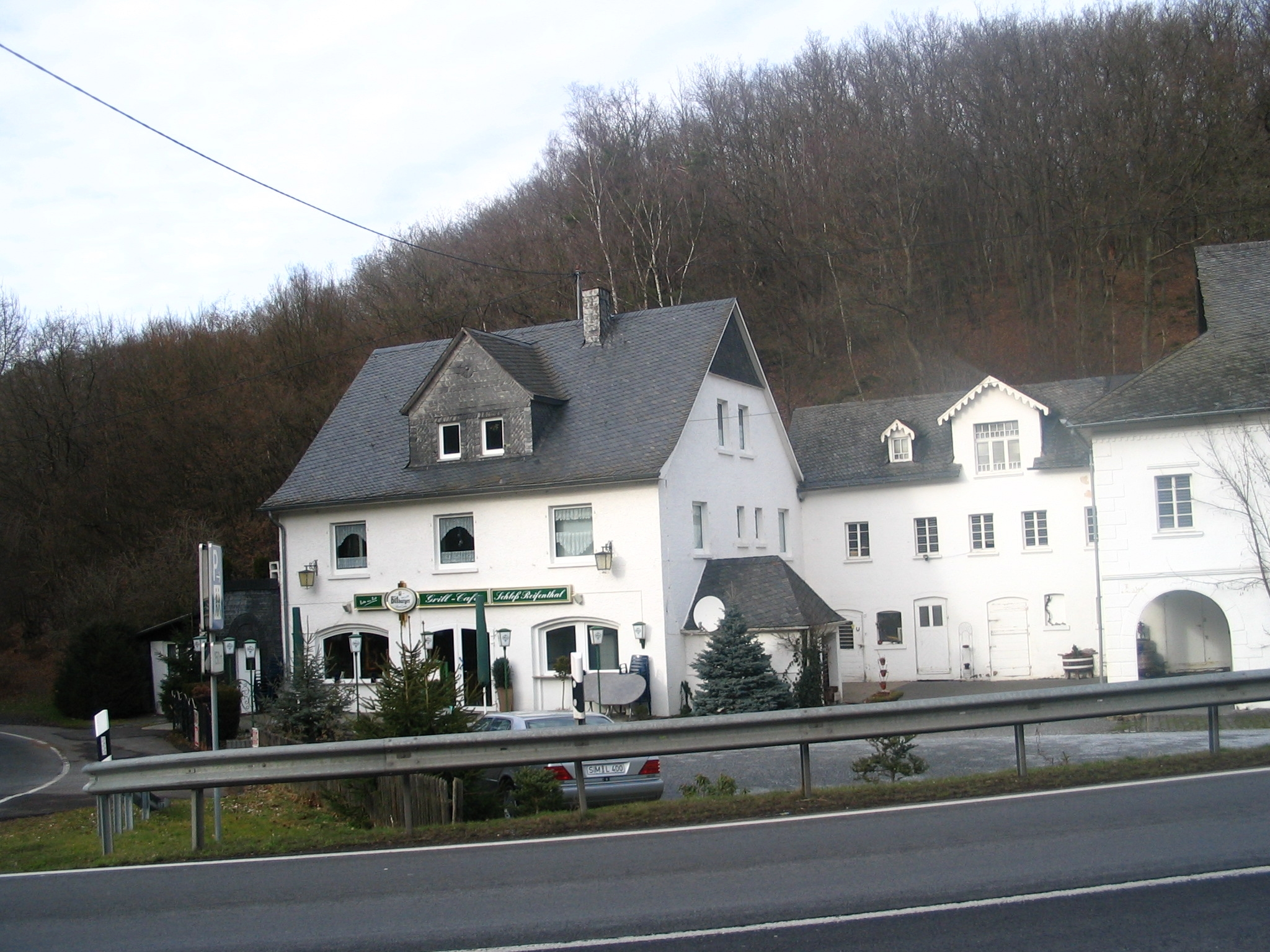 Gasthaus Schloß Reifenthal, Hunsrück, Germany